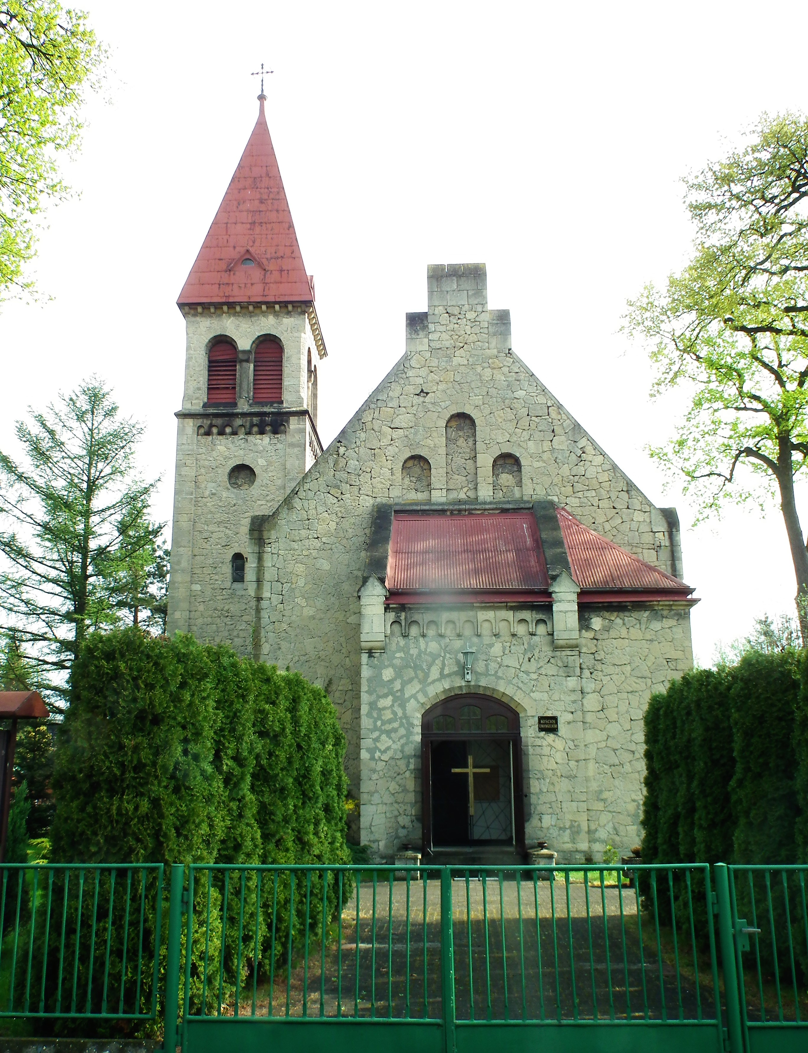 Kościół ewangelicki w Zawadzkiem.